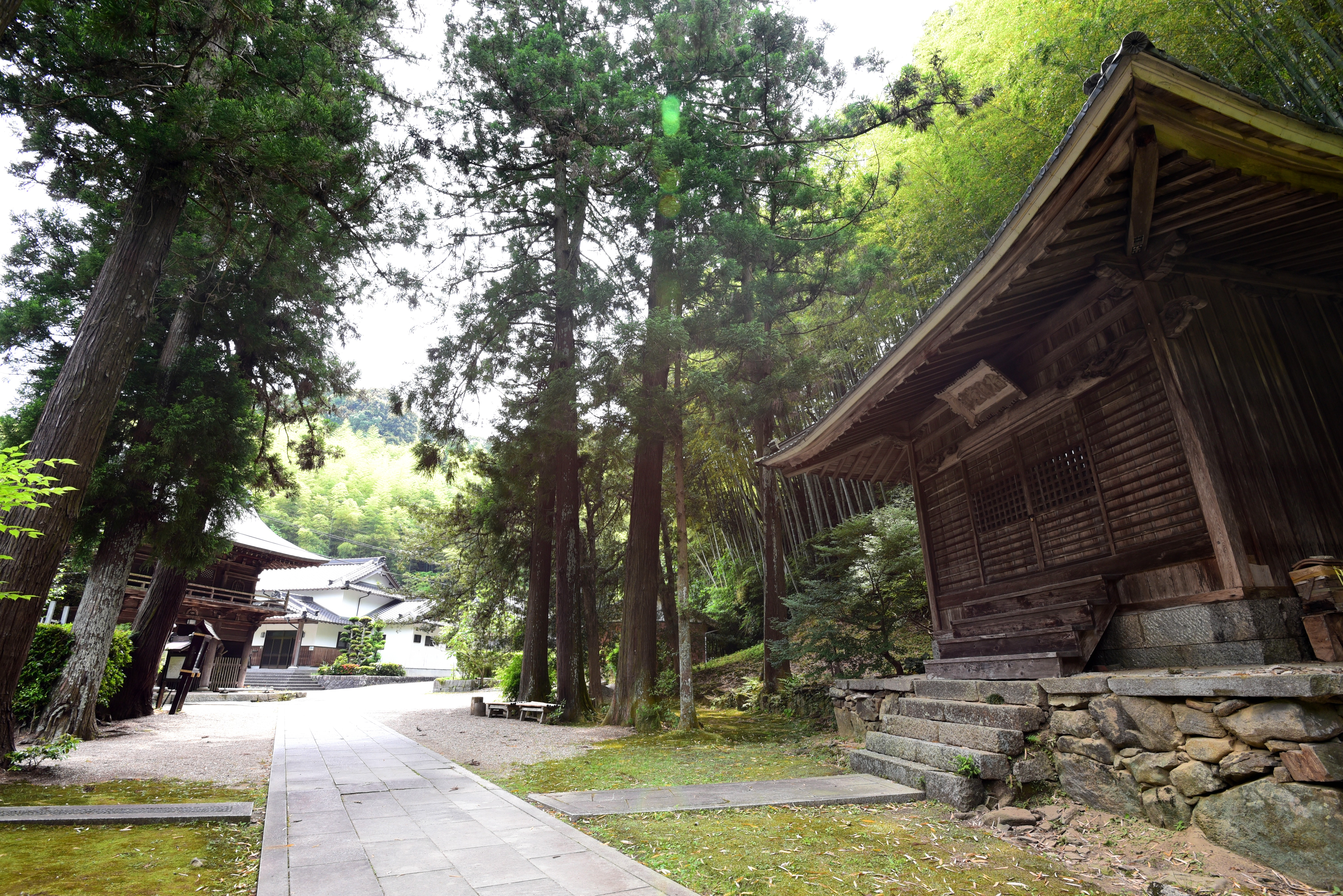 龍渓院境内 Nikon D750